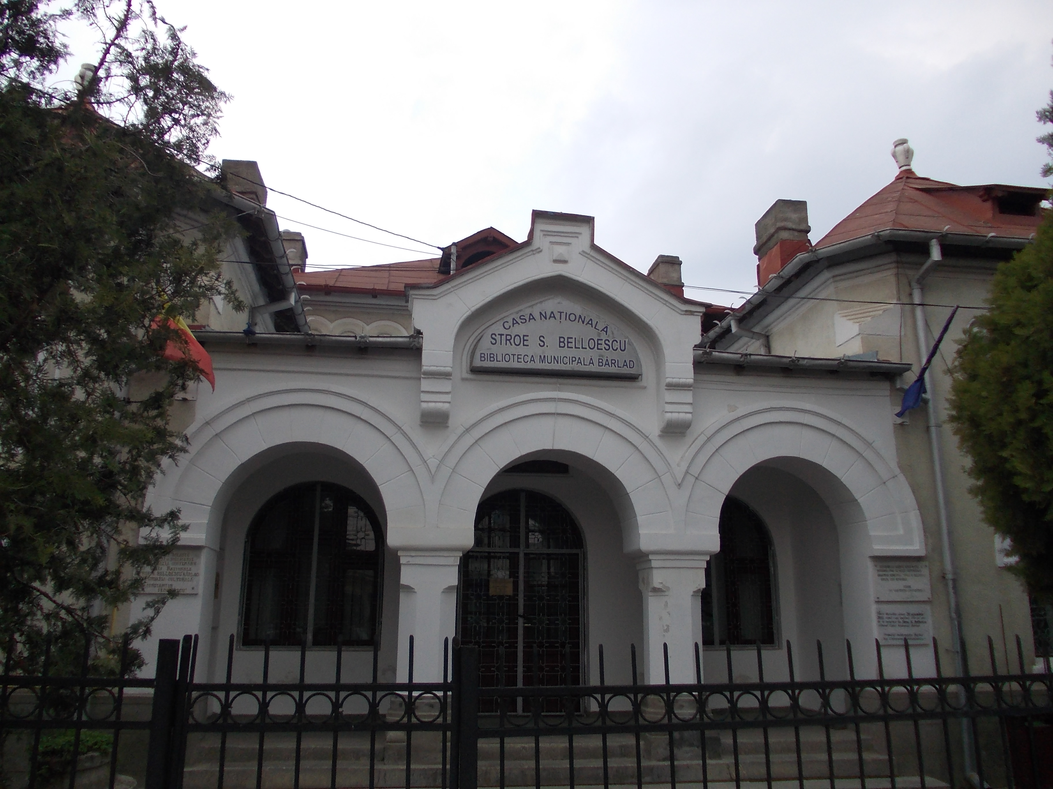 biblioteca Bârlad